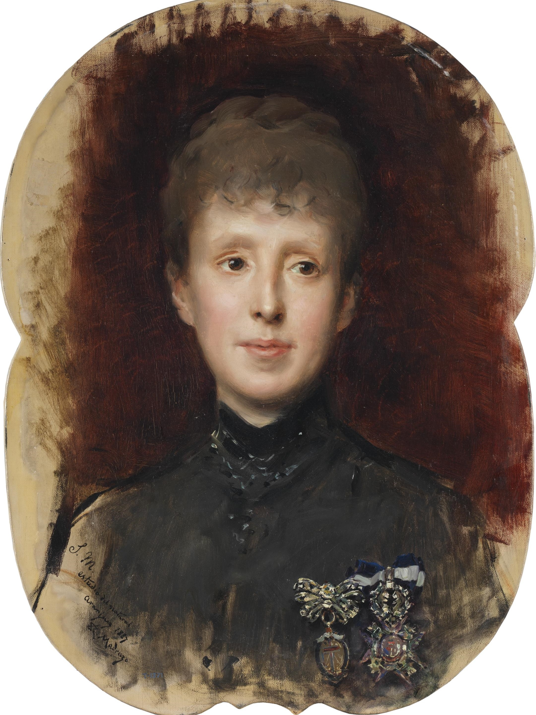 Esta obra es un estudio preparatorio para el retrato de la reina María Cristina de Habsburgo-Lorena (1858-1929), que fue la segunda esposa del rey Alfonso XII de España, que se conserva actualmente en la Embajada de España en París.